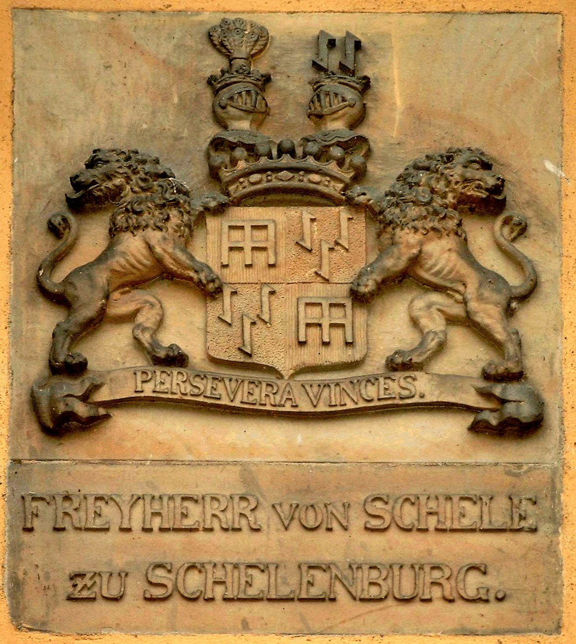 Familienwappen derer zu Schele der Schelenburg in 49143 Bissendorf